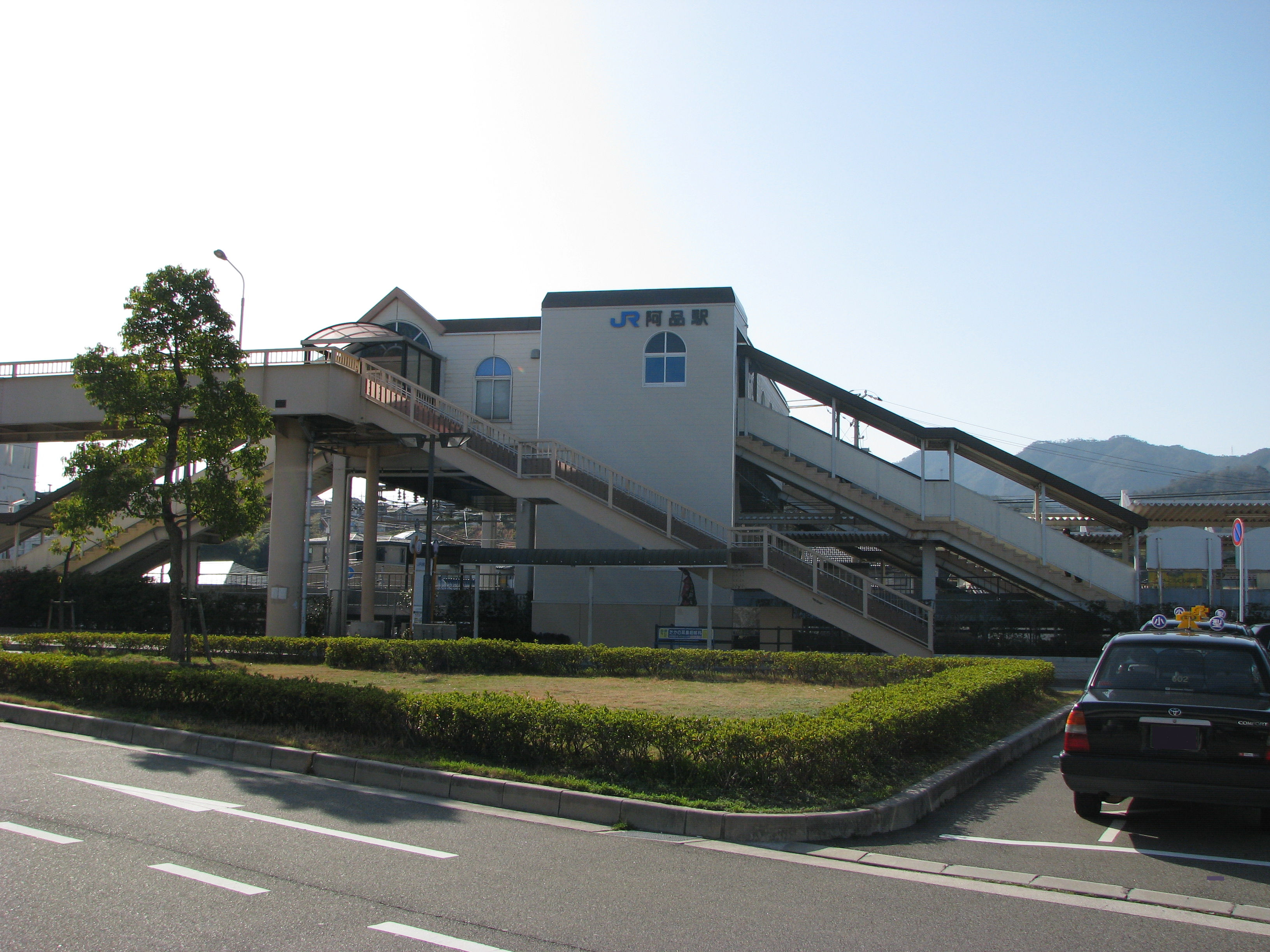 西日本旅客鉄道阿品駅 エレベーター設置後